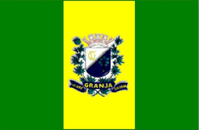 Bandeira do município de Granja-CE